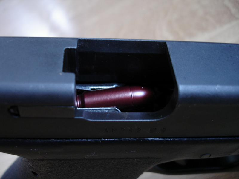 Glock 17 9mmPara (erste Ausführung - Februar 1986)